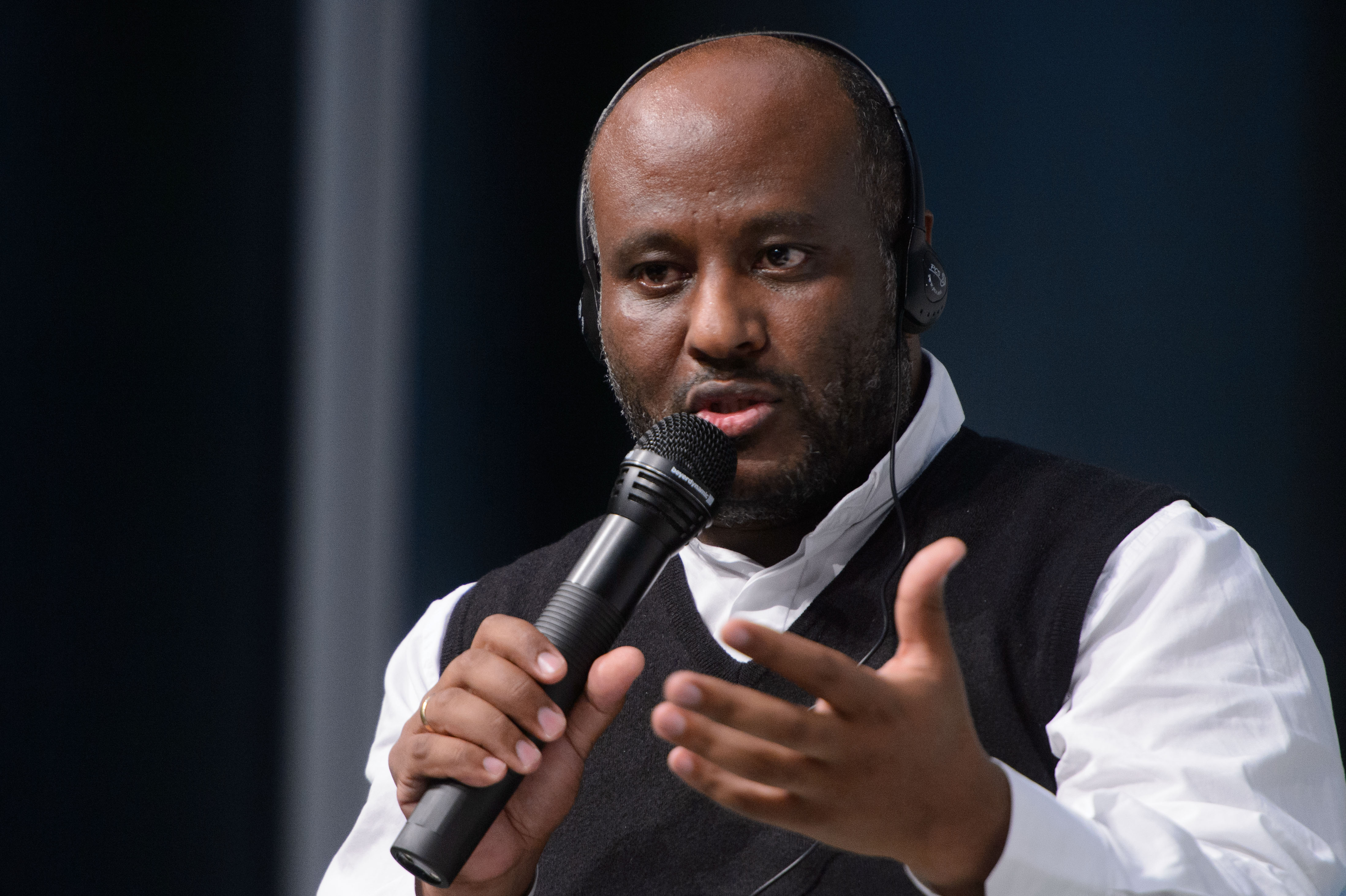 Father Mussie Zerai (Agenzia Habeshia per la Cooperazione allo Sviluppo), Foto: Stephan Röhl